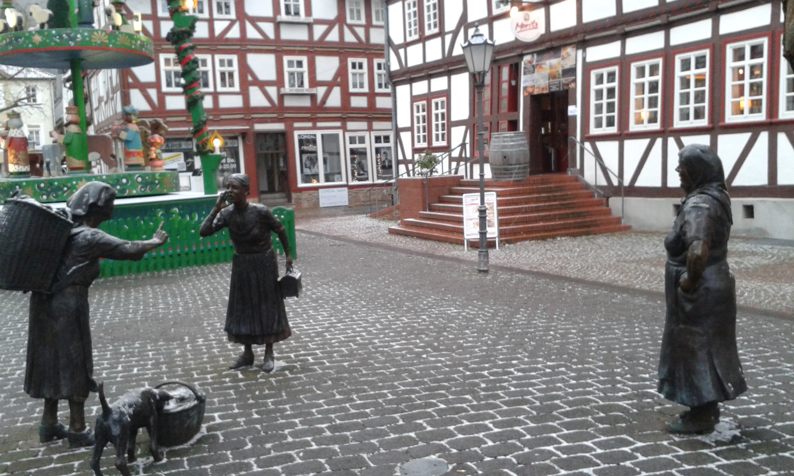 Interlingue: Gruppe de figuras sur li plazza del mercate in Rotenburg an der Fulda